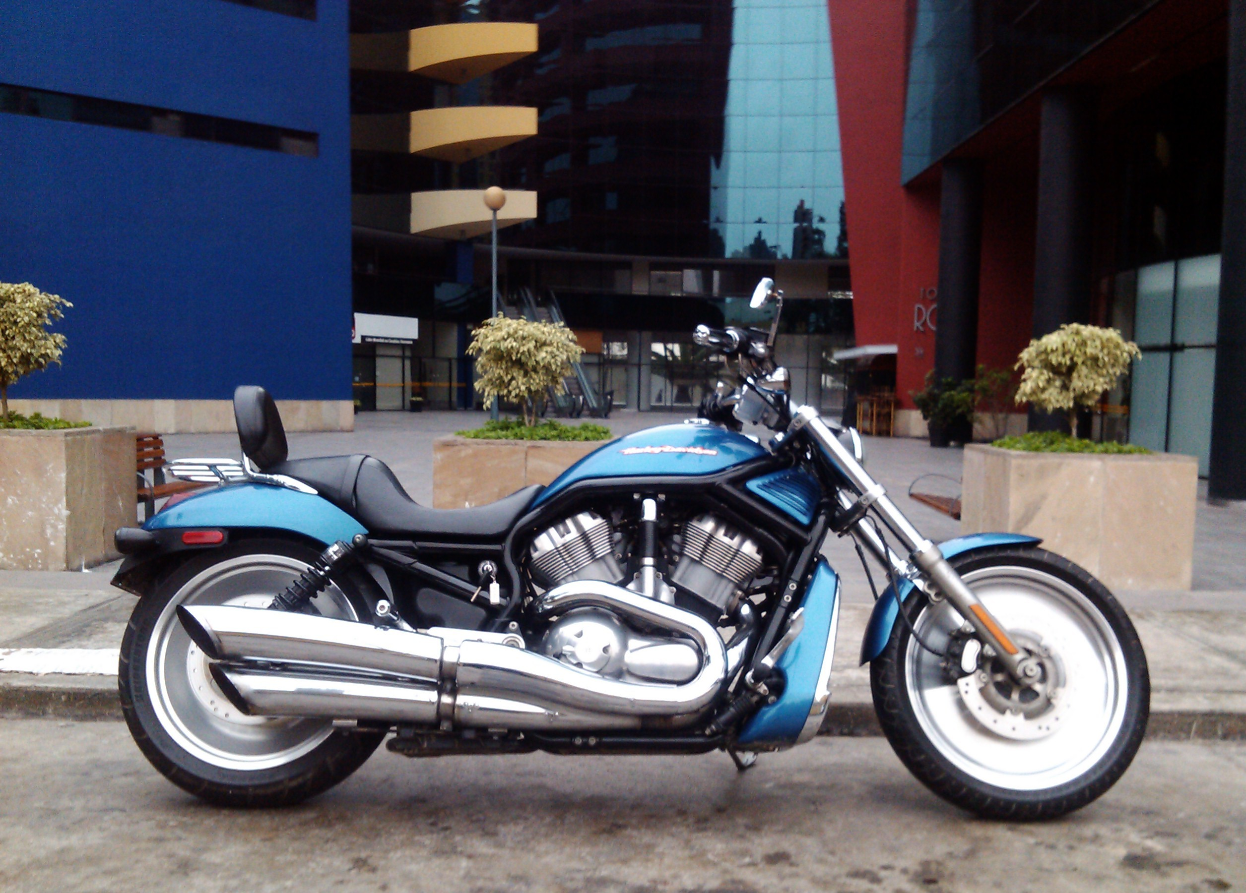 Harley Davidson V-Rod VRSC